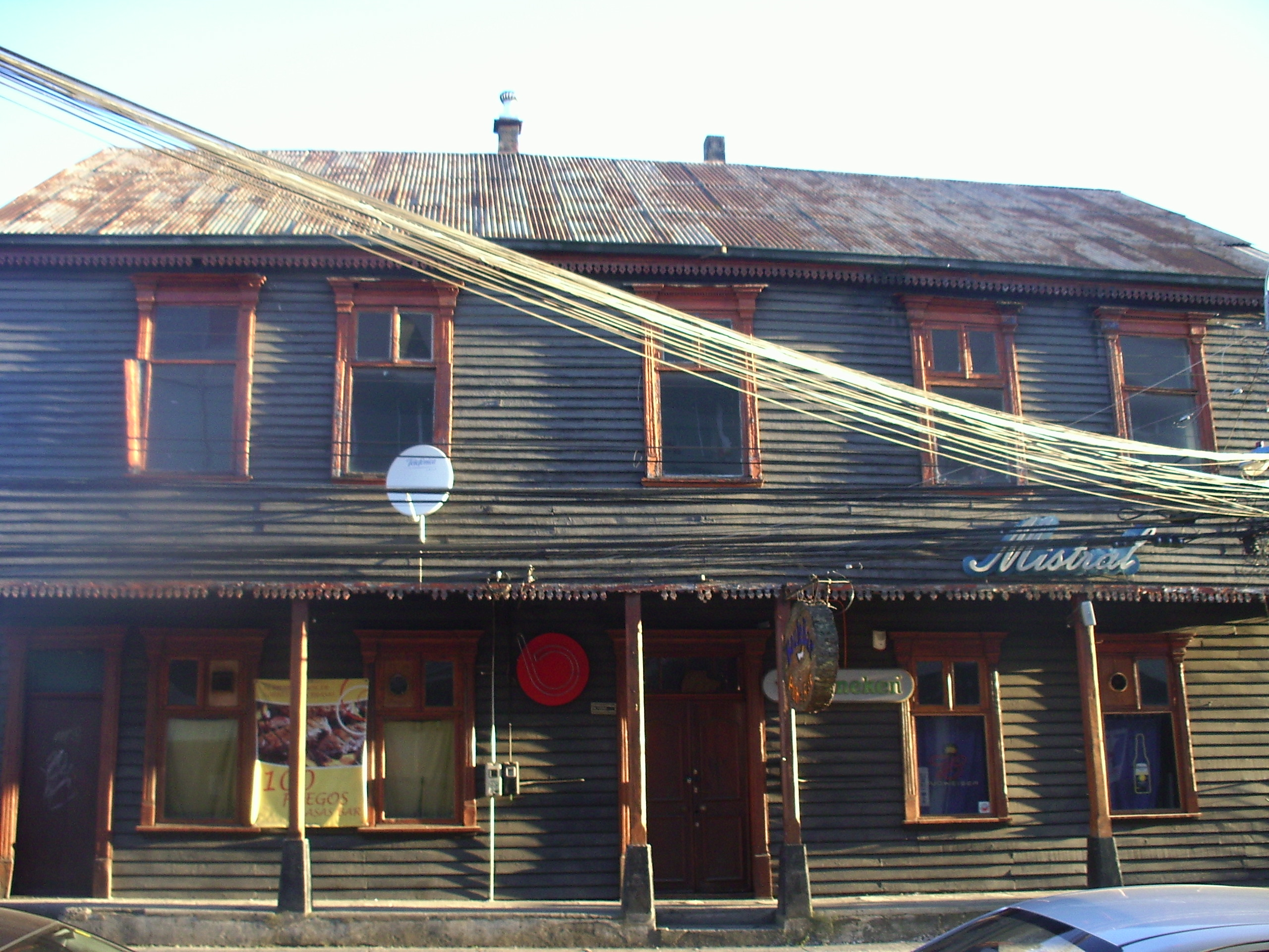 Casa Mohr Pérez This is a photo of a national monument in Chile: 713